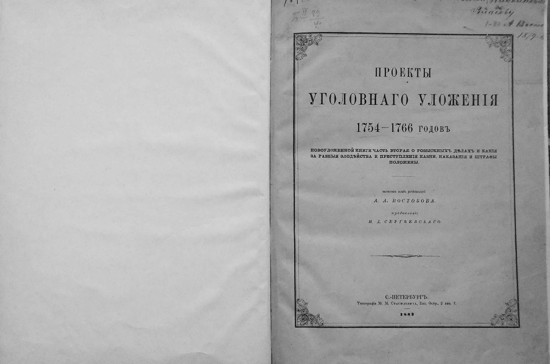 Проекты уголовного уложения 1754—1766 годов